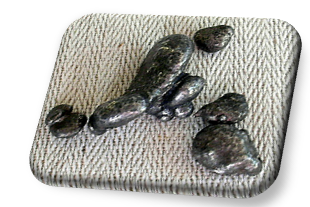 Olovo - Pb